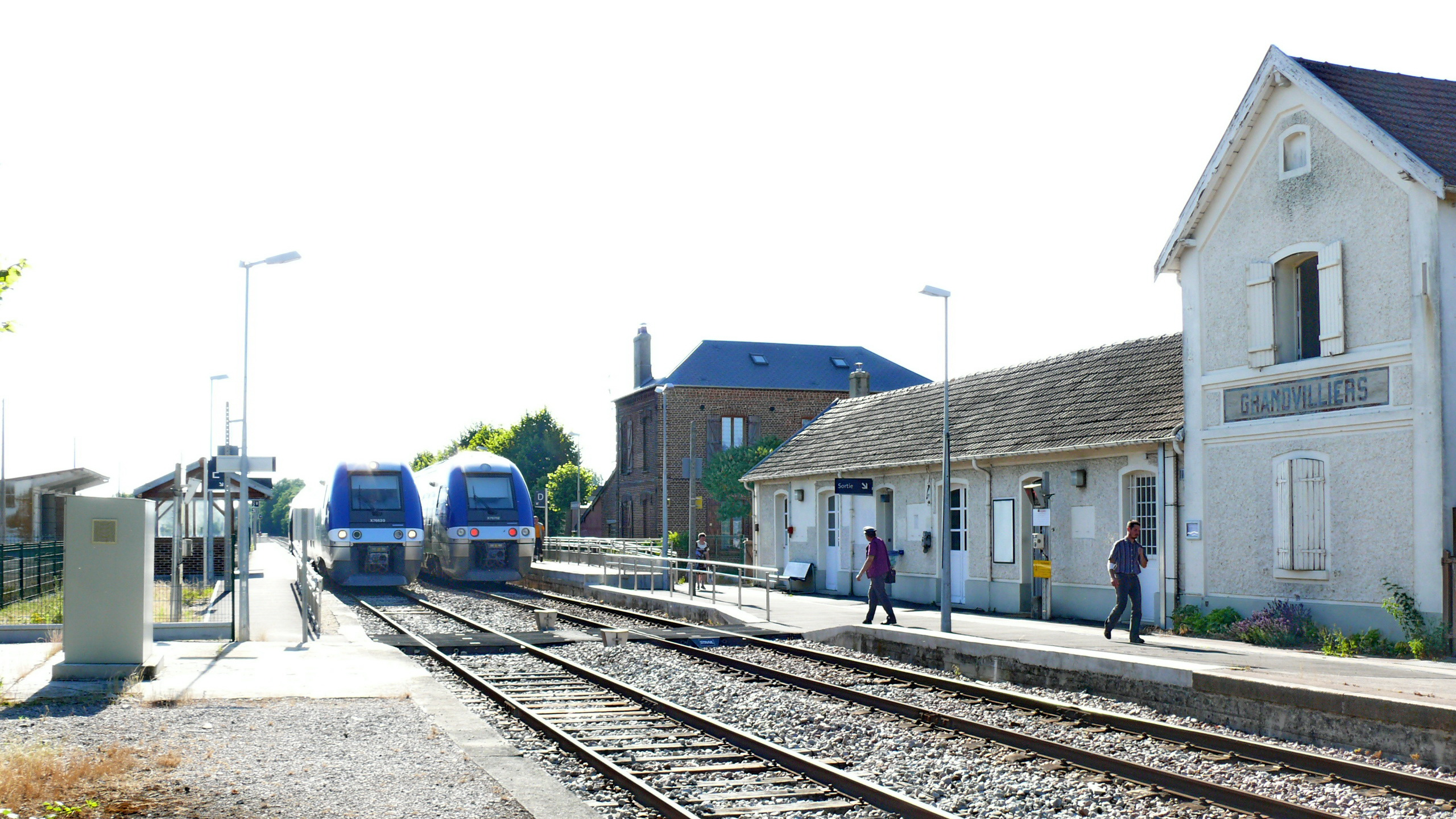 Gare de Grandvilliers, après rénovation et mise en accessibilité PMR : croisement des autorails X76630 et X76751